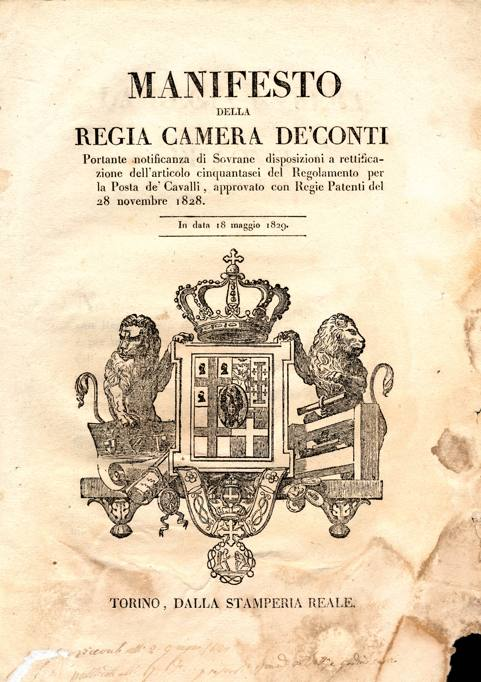 Regolamento per la Posta de' Cavalli - Regno di Sardegna